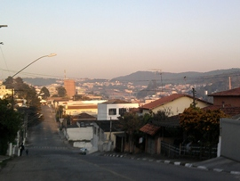 Description